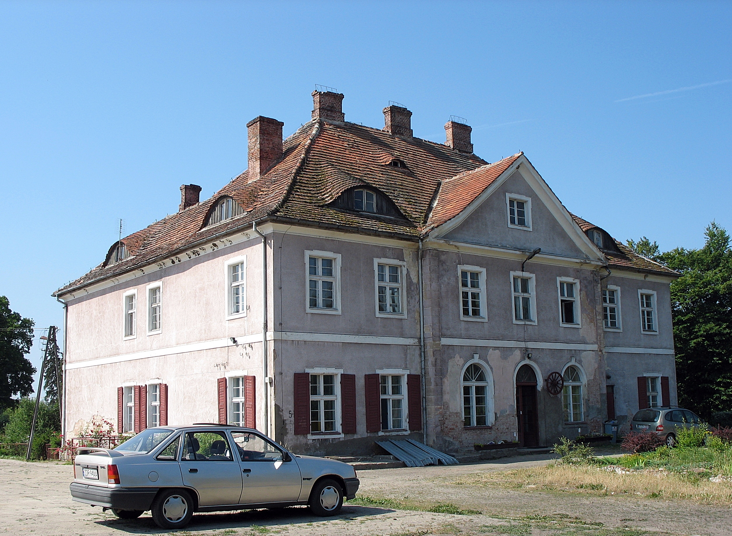 Gawroniec, pałac, XVIII/XIX, 1923